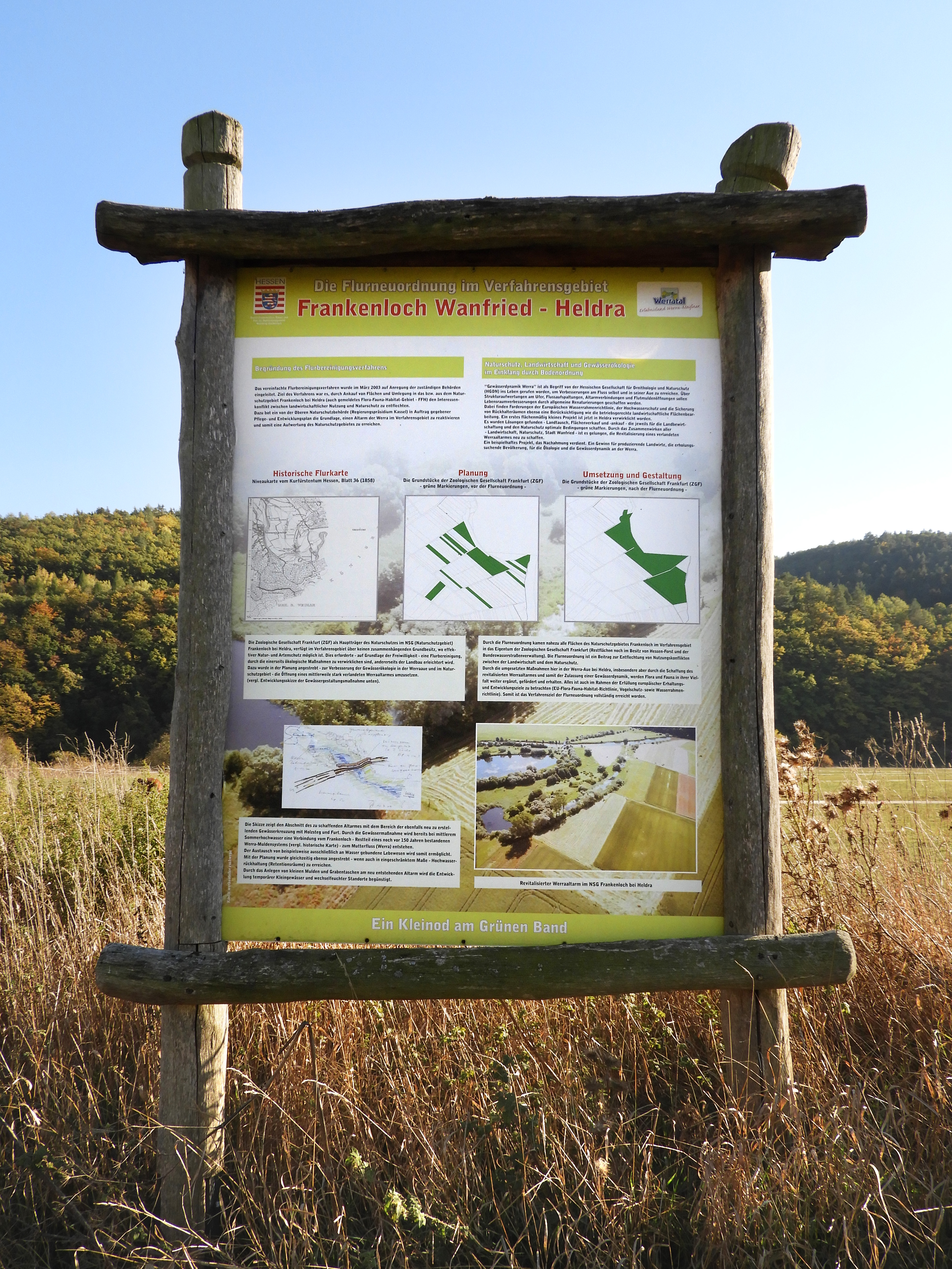 Informationstafel im Naturschutzgebiet. Um Akzeptanz für die Veränderungen im Schutzgebiet zu erreichen wurden neben der Holzbrücke über die Flutmulde zwei Infotafeln aufgestellt. Sie erteilen Auskunft über die ökologische Bedeutung des Frankenlochs und sollen den Besuchern ermöglichen den Sinn und Zweck der Maßnahmen nachzuvollziehen.